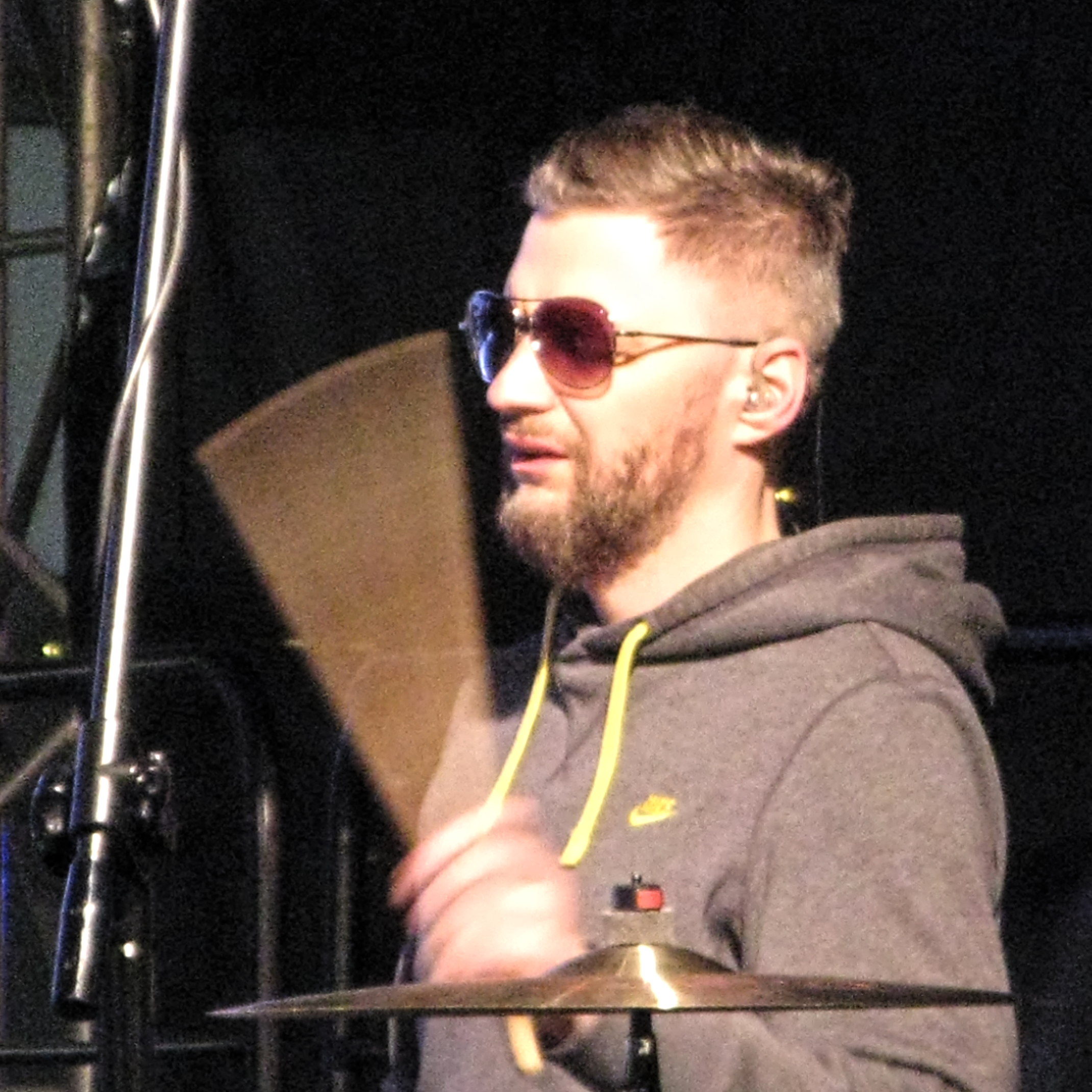 polski perkusista Piotr Penkała o pseudonimie Pierre (Spacepierre) grający na perkusji podczas koncertu zespołu Krzikopa na katowickim rynku, darmowa plenerowa impreza ze wstępem wolnym towarzysząca Jarmarkom Śląskim (Jarmark Bożonarodzeniowy 2018 w Katowicach)